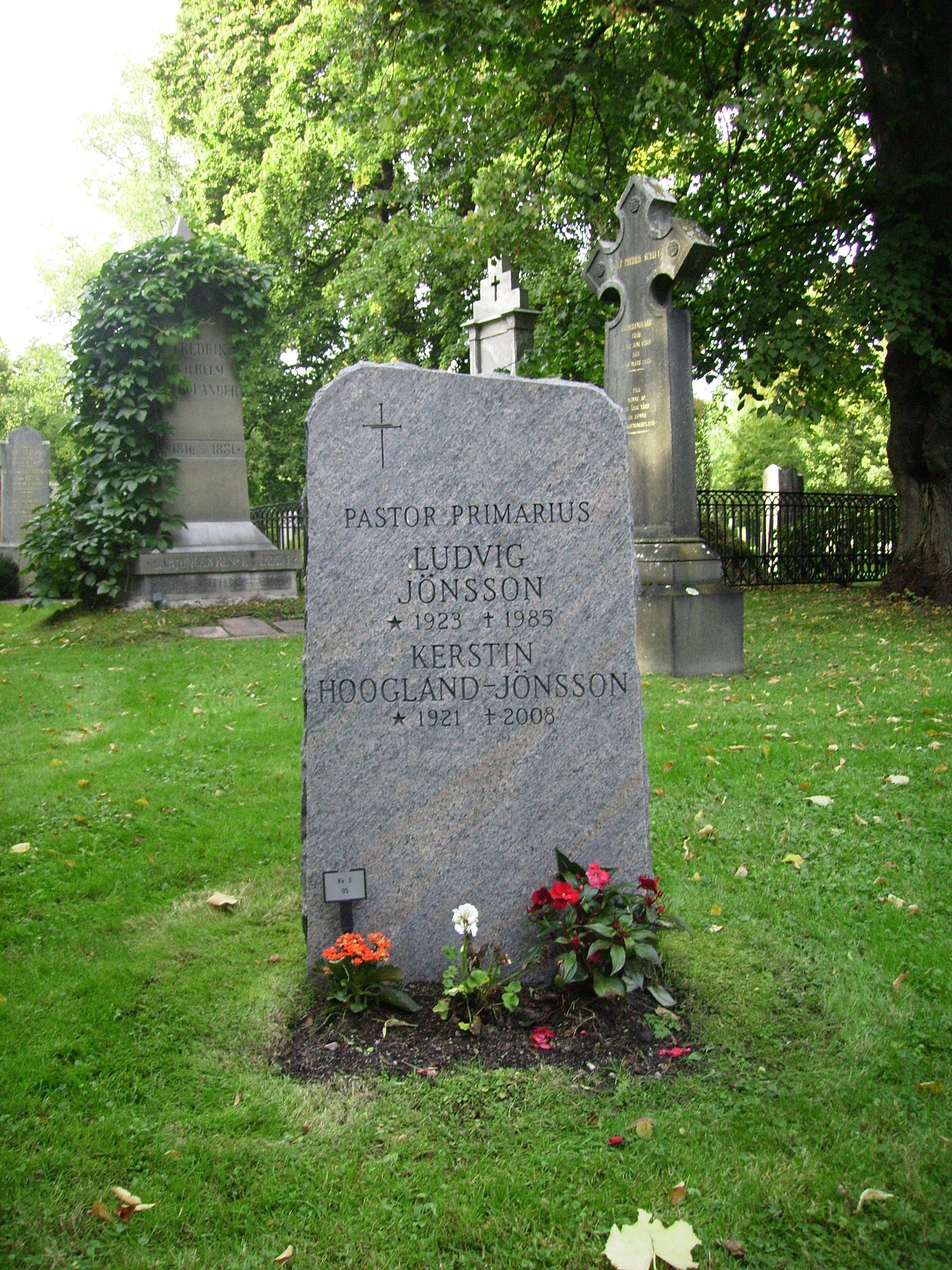 Picture of Ludvig Jönsson's grave at Norra begravningsplatsen i Solna. Swedish clerical person (pastpr primarius in Stockholm).